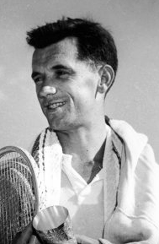 Mervyn_Rose